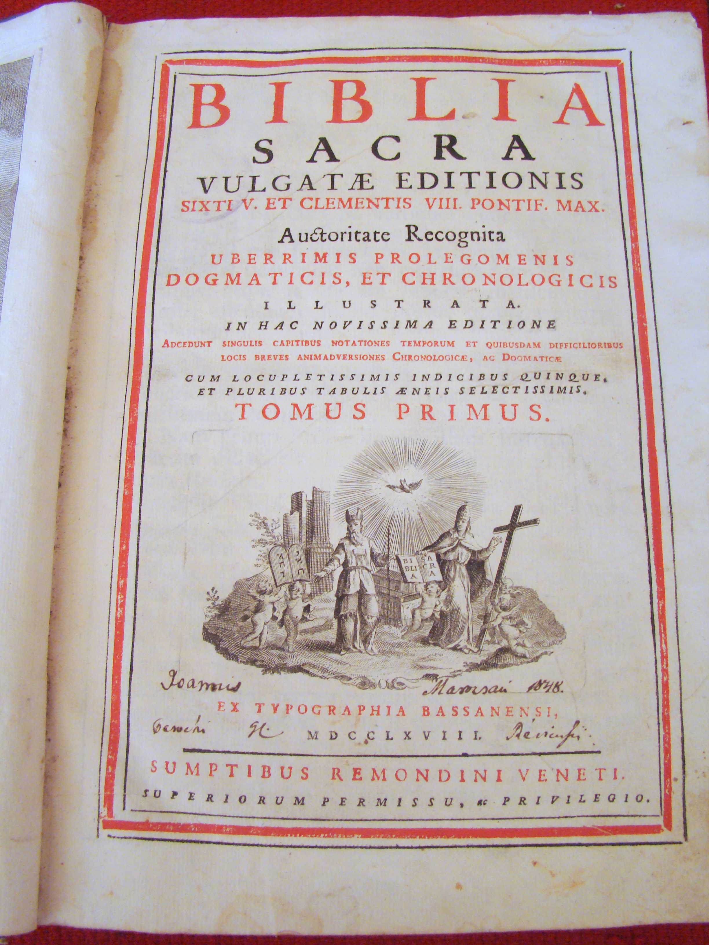 Biserica ortodoxă „Sf. Arhangheli Mihail și Gavriil”, sat Vadu Crișului; comuna Vadu Crișului